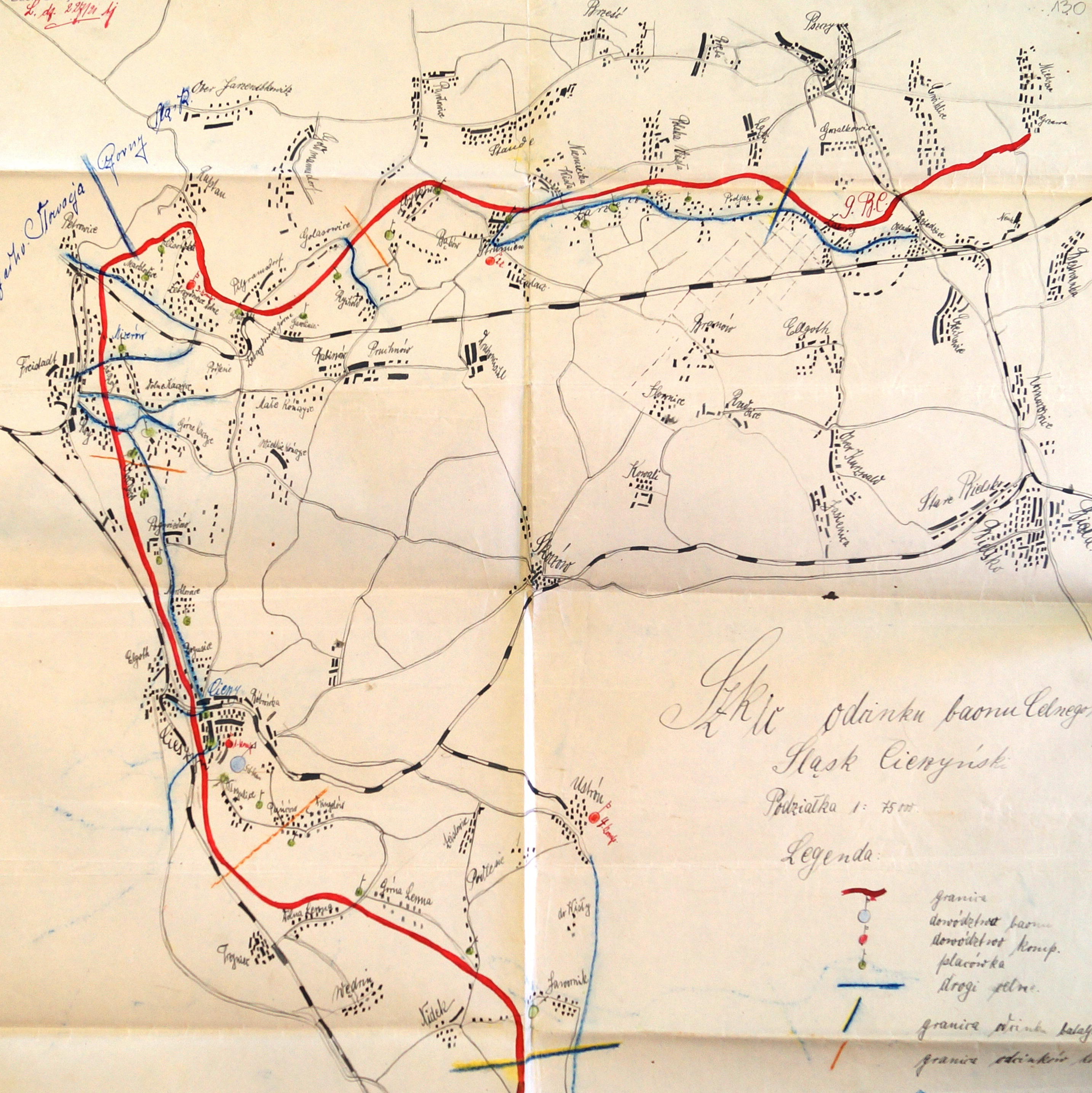 Szkic rozmieszczenia 19 batalionu celnego Cieszyn